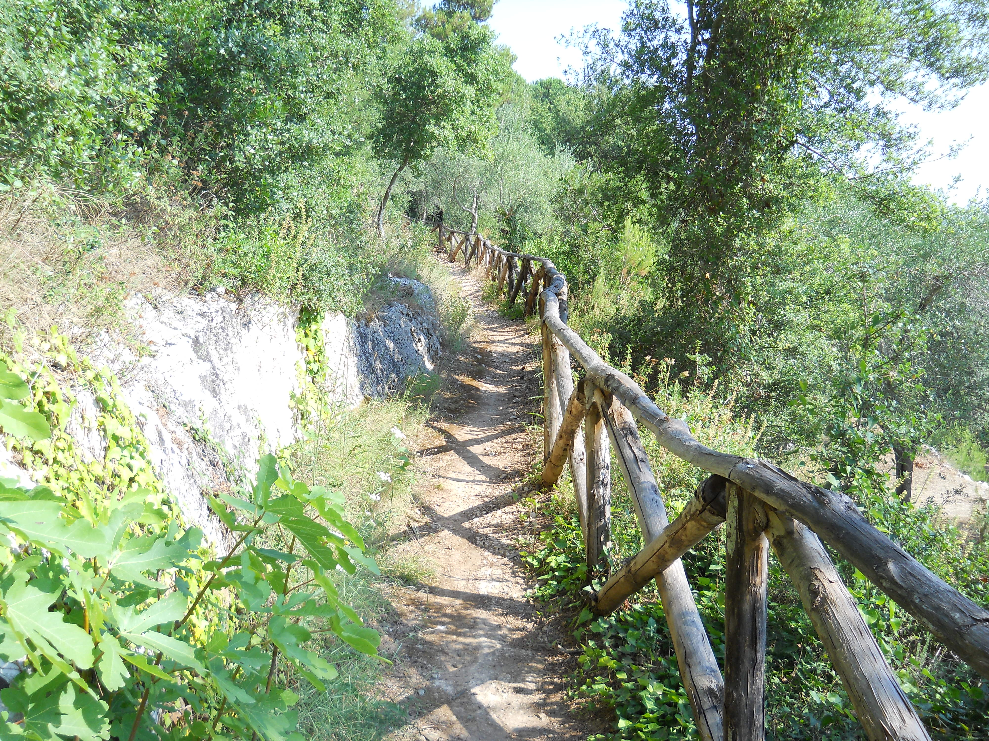 Sentiero del bosco della Serra di Ruffano